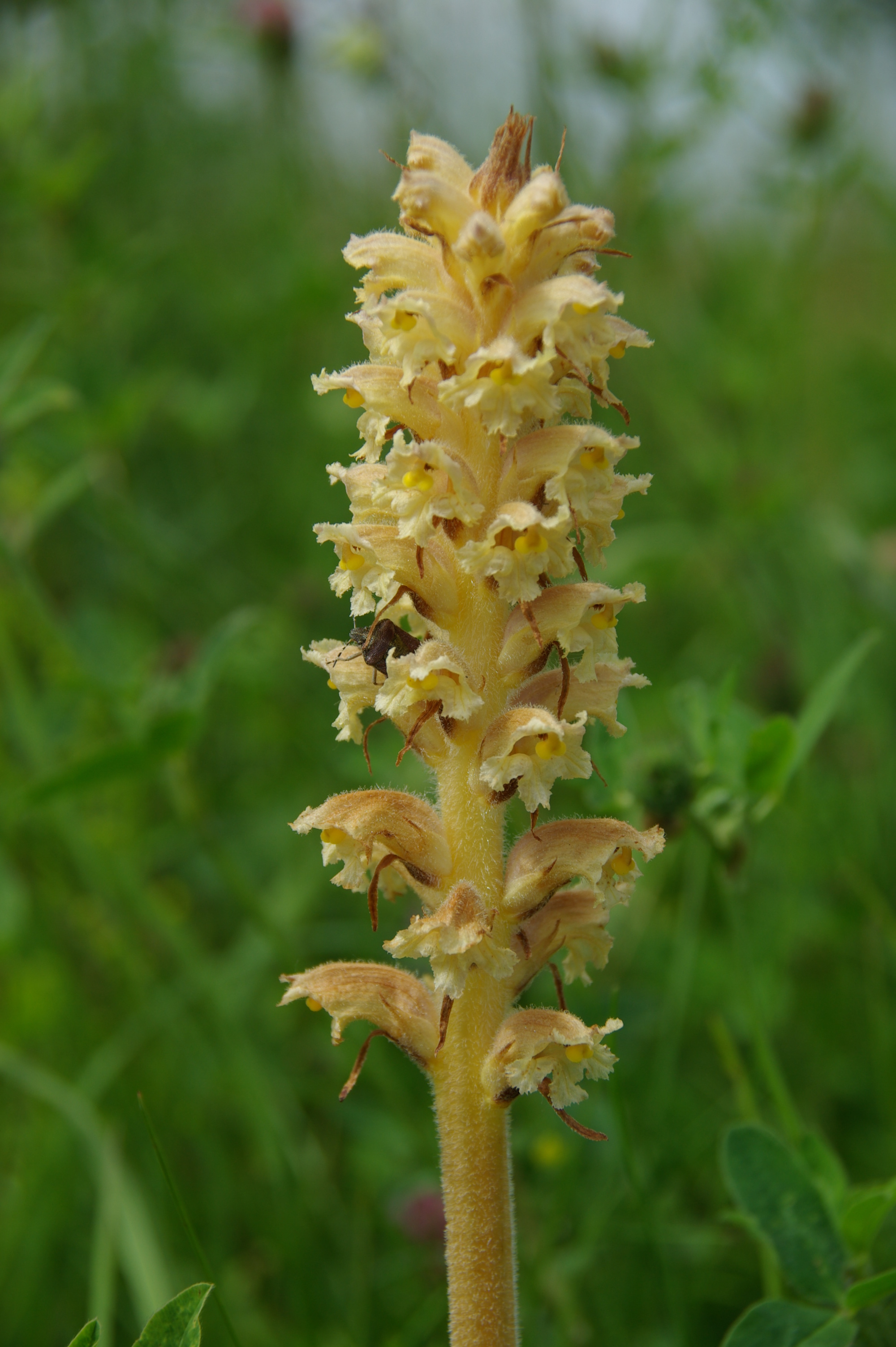 Põdrajuure-soomukas (Orobanche bartlingii) kuulub soomukate perekonda,on parasiittaim-parasiteerib põdrajuurel.Nad on pruunikate soomusjate lehtede ja lihaka varrega taimed, mida esmapilgul võiks käpalisteks pakkuda. Nende kahehuulelised õied asetsevad kobarjas õisikus, juured kinnituvad nagu teistel parasiittaimedel imiorganitena liigiomase loodusliku või kultuurperemeestaime juurtele.Soomukad on haruldased,põdrajuure-soomukas on kantud Eesti punasesse raamatusse.